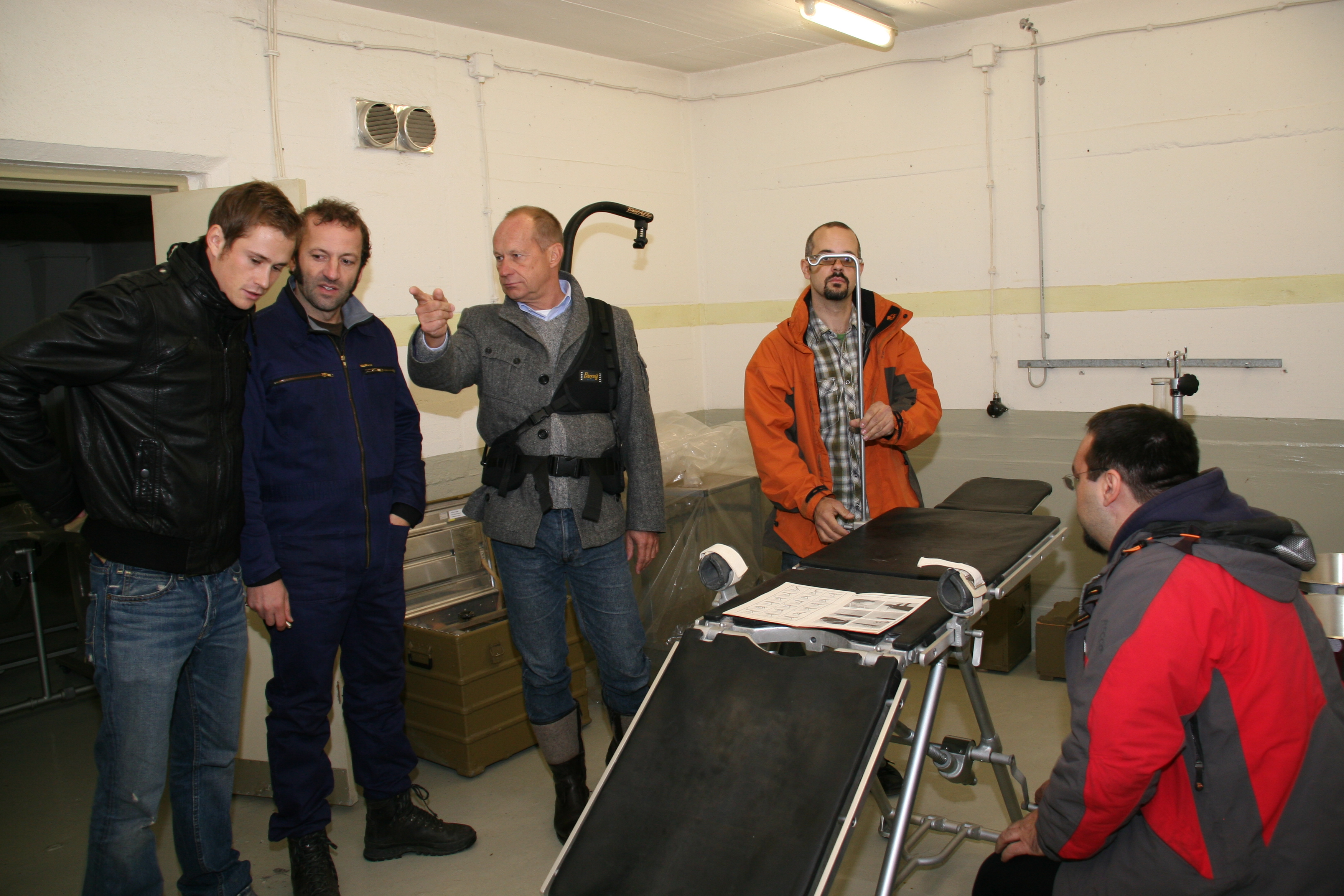 Fernsehmoderator Max Schmidt im Hilfskrankenhaus Gunzenhausen für Dreharbeiten, Nov. 2009